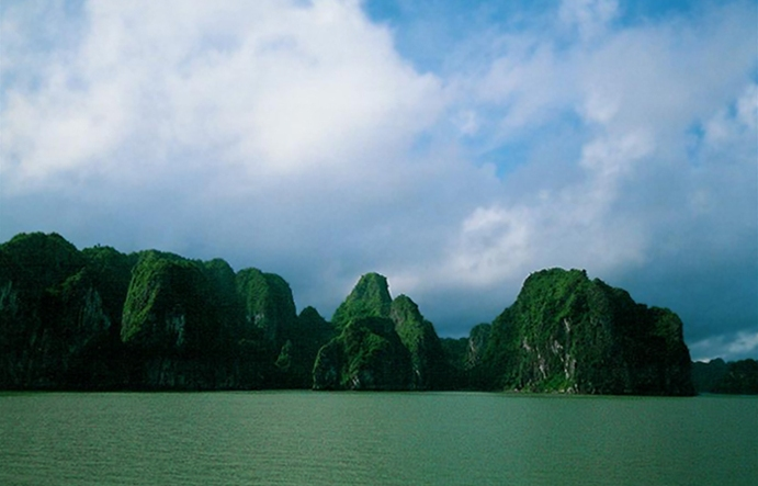 Ha Long Bay, Vietnam - 1998